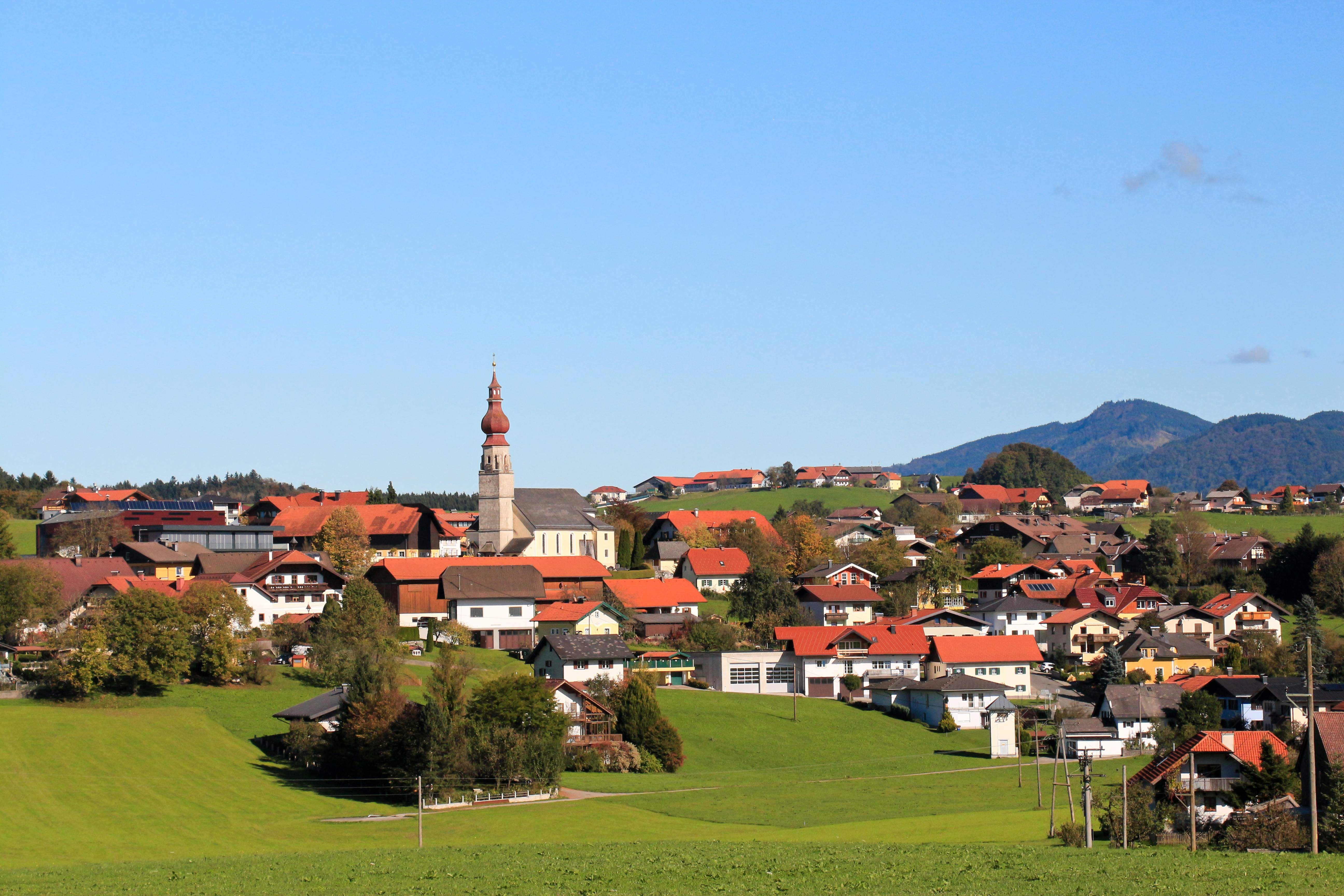 Gemeinde Hallwang, Bezirk Salzburg-Umgebung - Ansicht von Westen